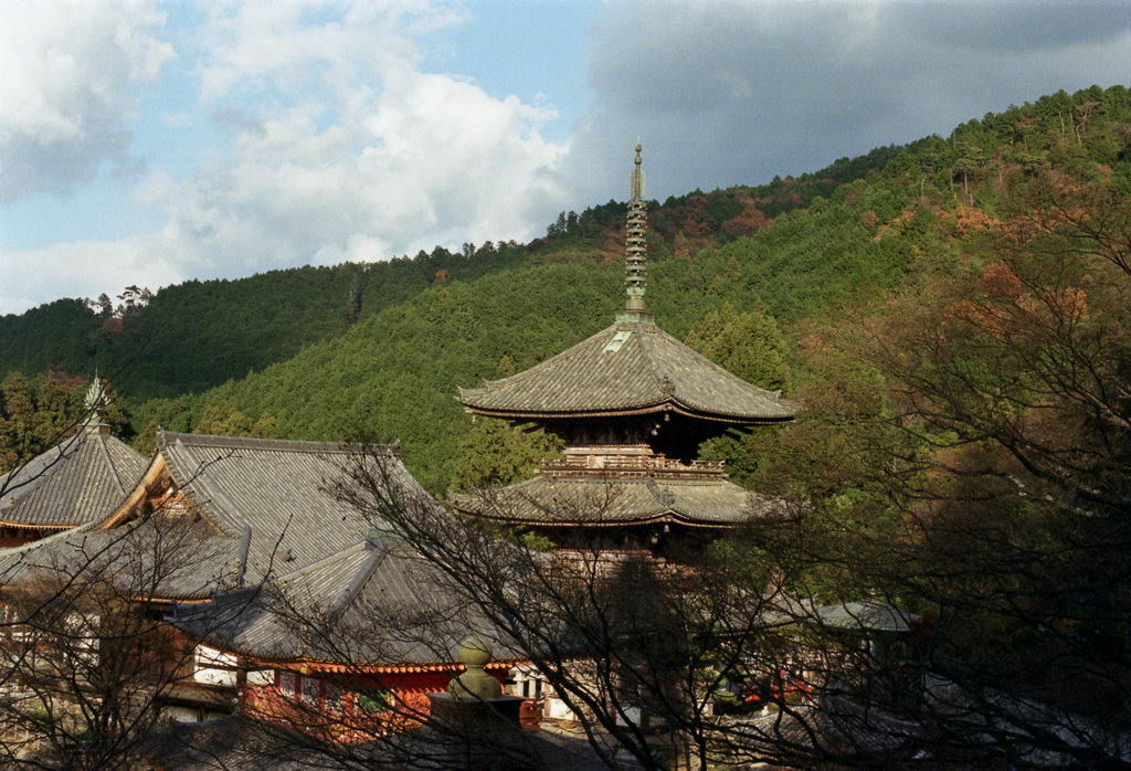 壷阪寺 （南法華寺）